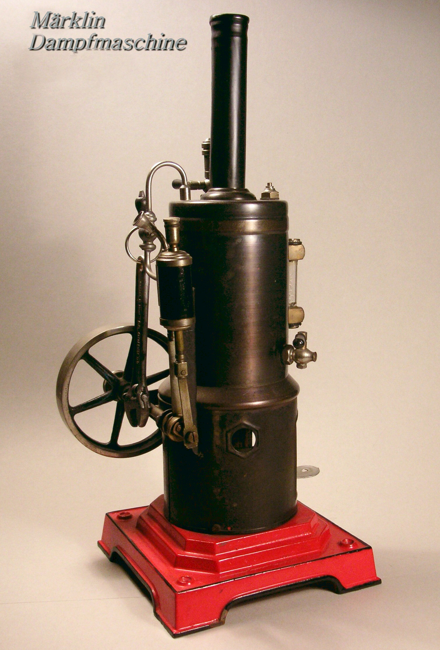 Märklin: Stehende Dampfmaschine; stahlblau patinierter Messing-Siederohr-Kessel, feststehender Zylinder, Rundschiebersteuerung; Dampfpfeife, Sicherheitsventil, Ablasshahn, Wasserstandsglas; Armaturen vernickelt; lackierter Eisengusssockel, Schwungrad 9 cm, Kessel 7,5 cm, ca 1909